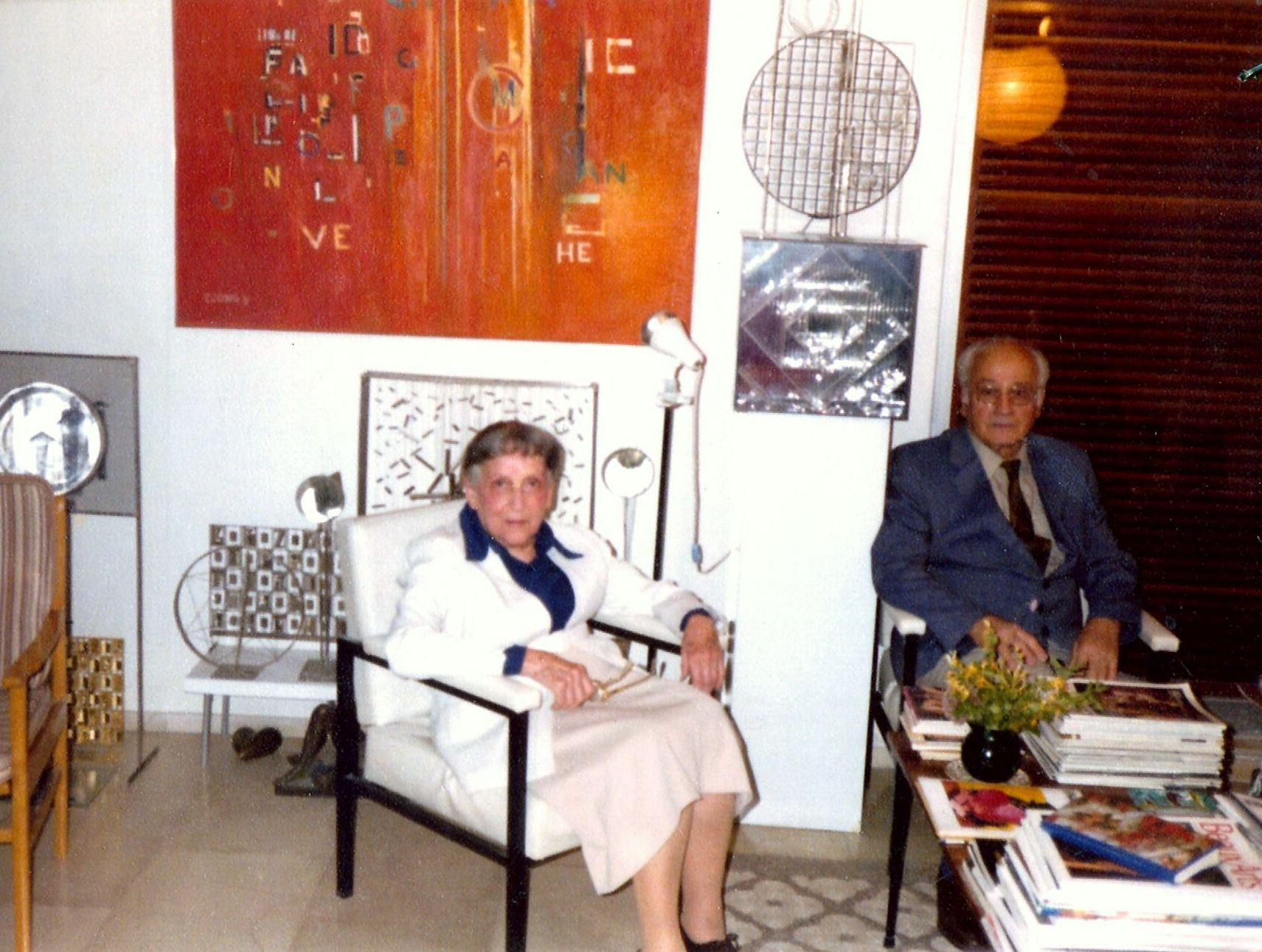 Το ζεύγος Ζογγολοπούλου το 1987 στην οικία τους.